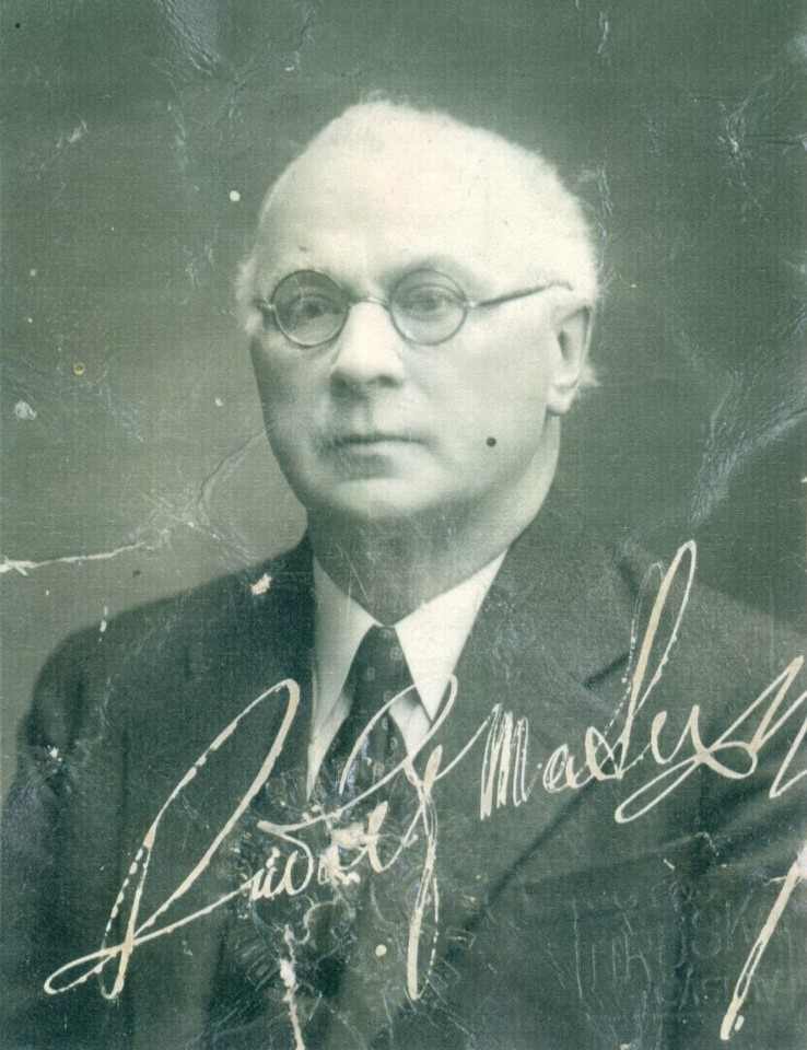 Rudolf Mates (1881-1966), český malíř, ilustrátor a pedagog